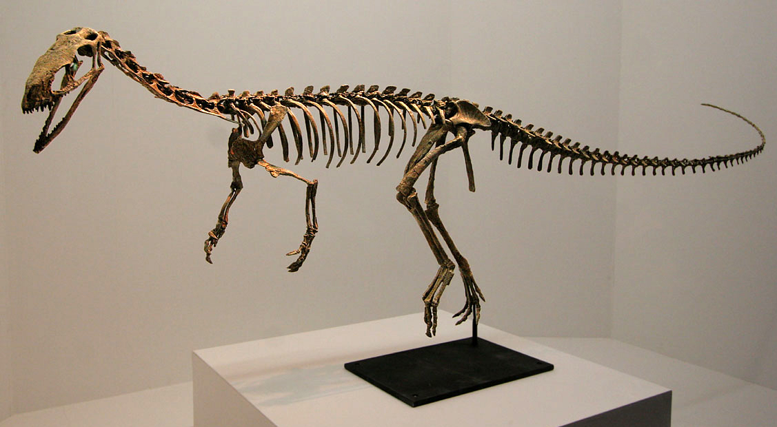 Eodromaeus murphi